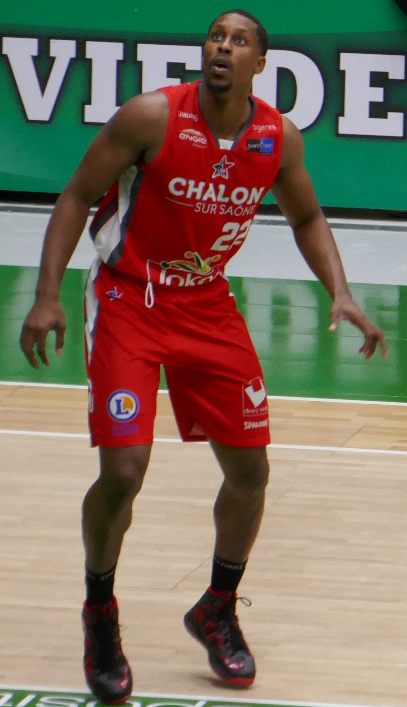 Jevohn Shepherd